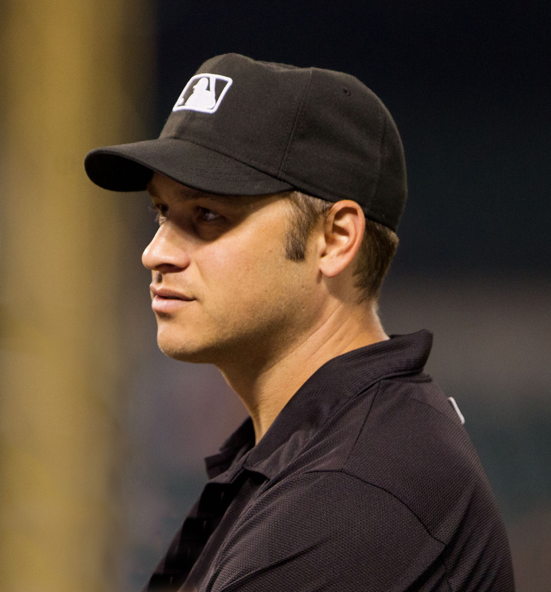 MLB umpire Mark Wegner - Mariners at Orioles August 6, 2012